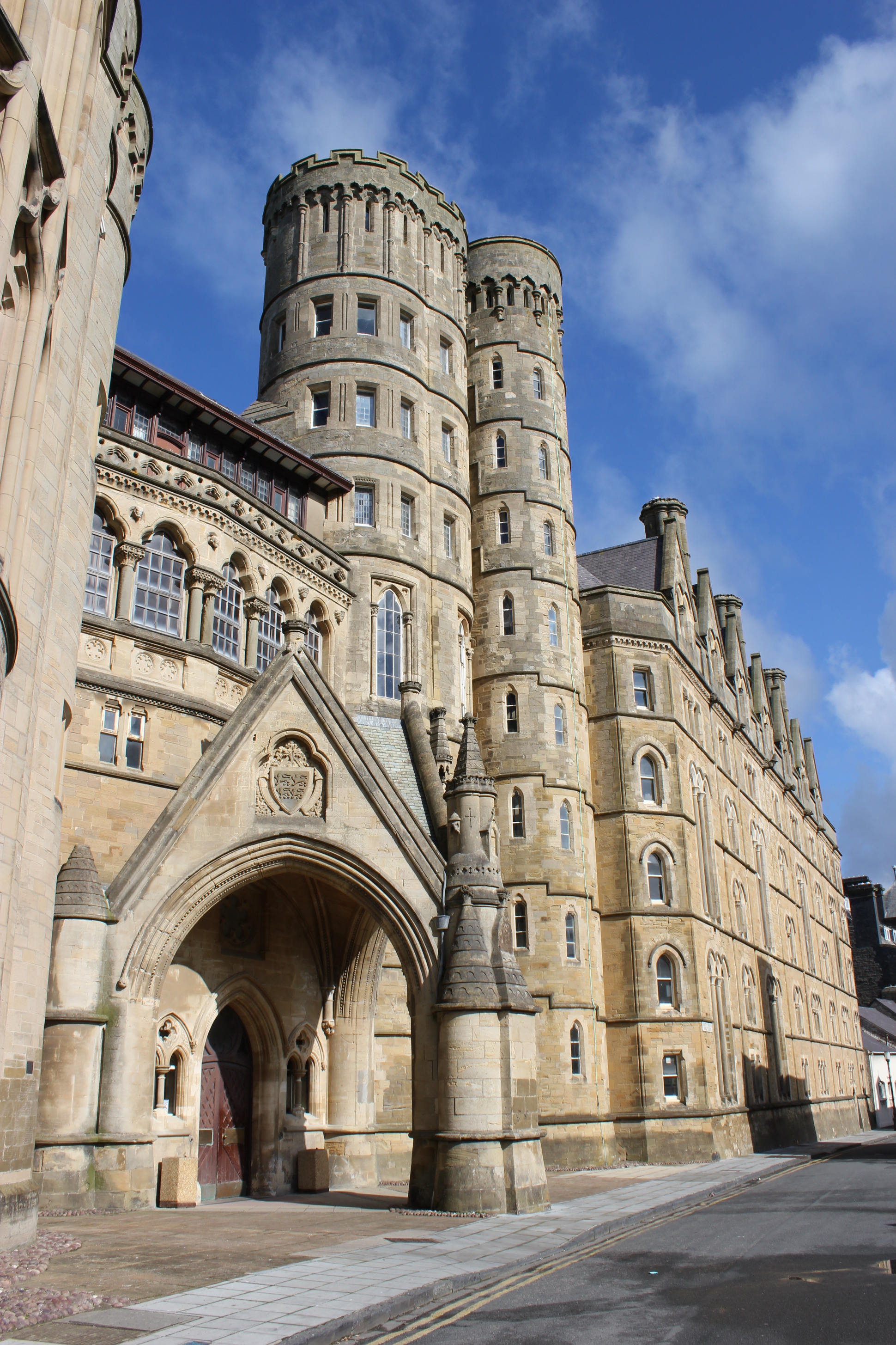 "The Cambria" in Aberystwyth; früher Hotel, heute Universitätsgebäude.